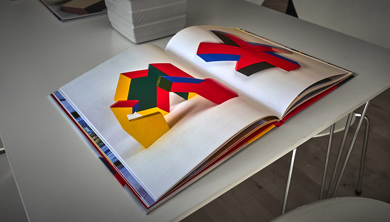 Utställning i Sjöbo 2018